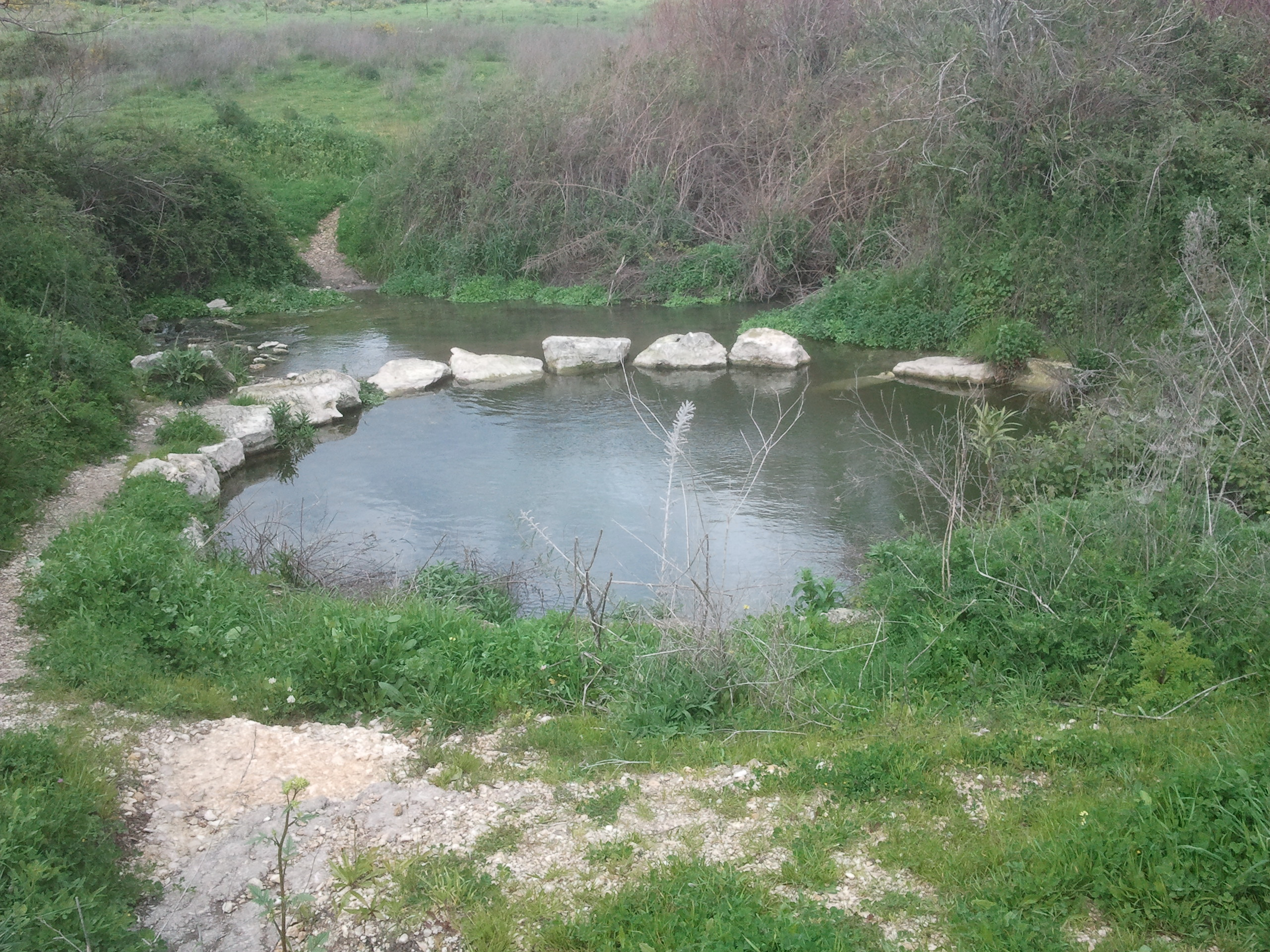 נחל תות מהווה גבול בין הר הכרמל ורמות מנשה. תחילתו ליד מחלף אליקים והוא נשפך לנחל דליה ליד בת שלמה בריכת מים בנחל כ-300 מטר ממזרח לכביש לתחנת כוח חגית